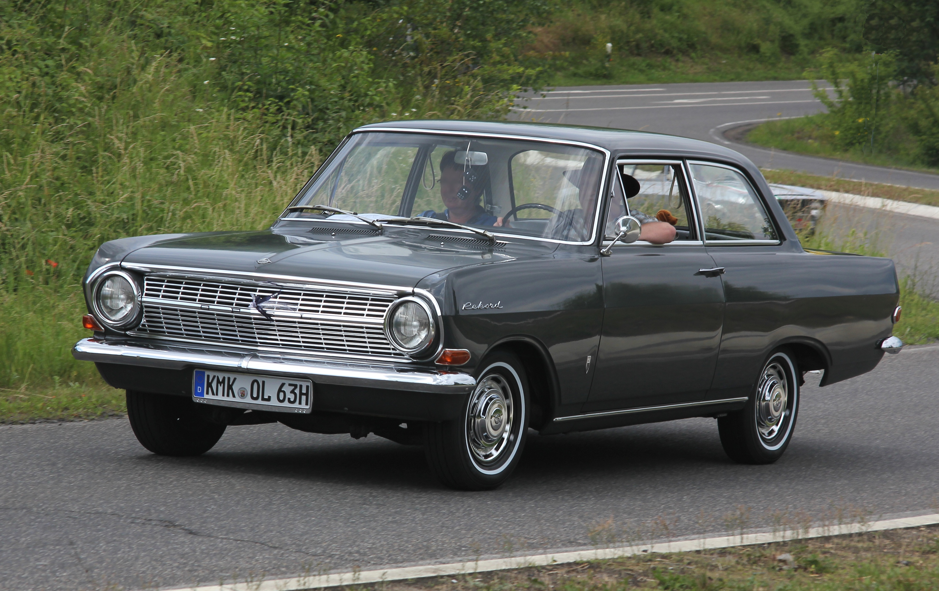 Opel Rekord A auf Sonntagstour (mit störendem Schleifchen am Kühlergrill), Fantasiekennzeichen